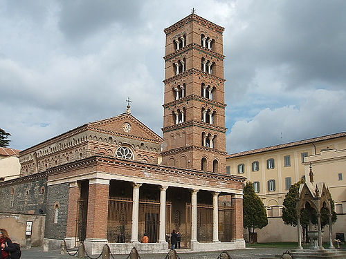 Grottaferrata, Lazio, Italia